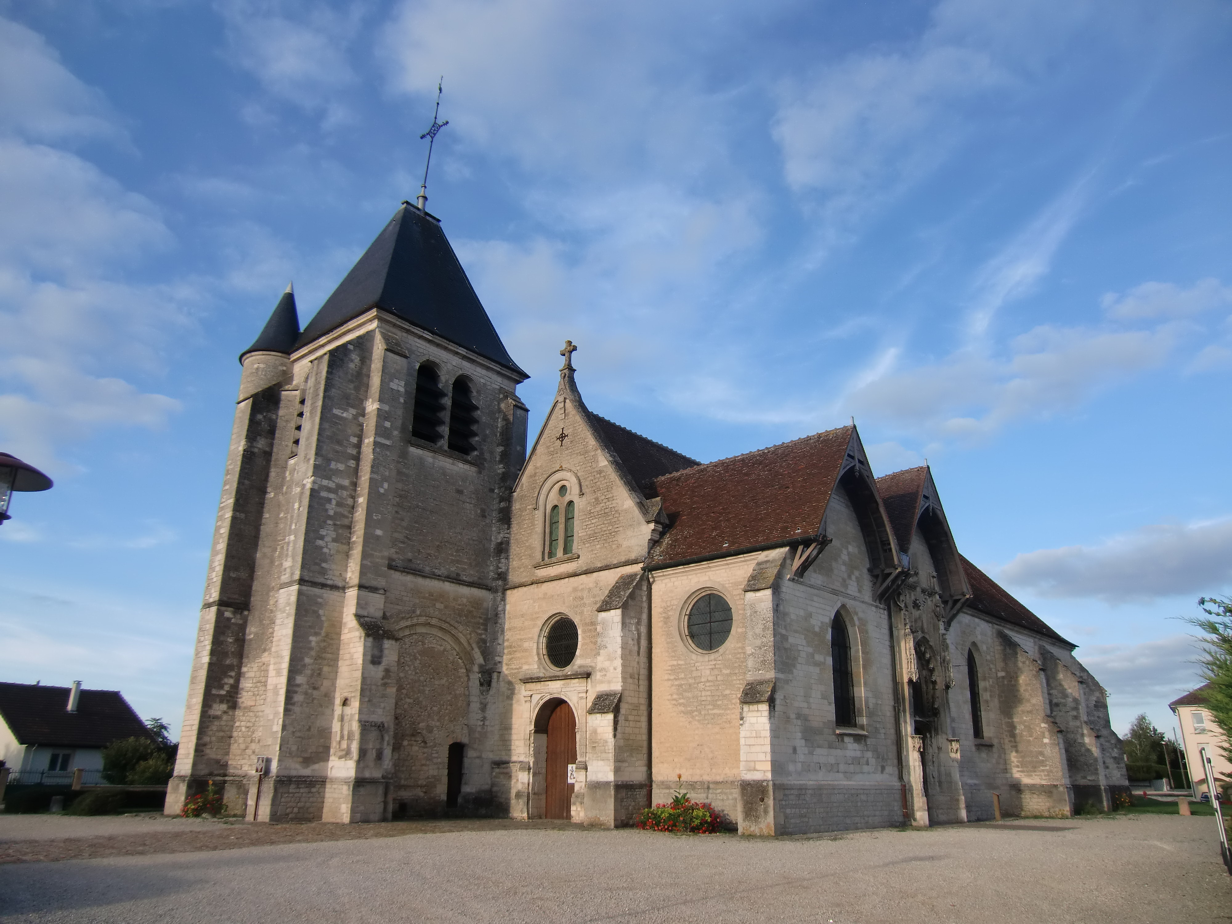 Eglise de Saint-Parres-aux-Tertres (Aube - Champagne - France)